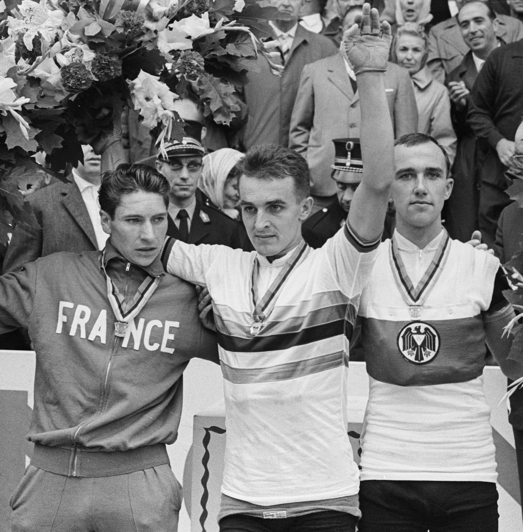 Wereldkampioenschappen wielrennen te Ronse. Amateurs. Huldiging. Vlnr: Francis Bazire, Flaviano Vicentini, Winfried Bölke